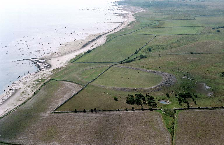 Fornborg RAÄnr Sandby 45:1. Bilden är tagen mot (väderstreck): S Motiv: Sandby 45:1 Nyckelord: Flygbilder, Riksintressen, Världsarv Kategori: Kust- och skärgårdsmiljö, Fornborg Fornborg RAÄnr Sandby 45:1. Bilden är tagen mot (väderstreck): S. Sandby 45:1.